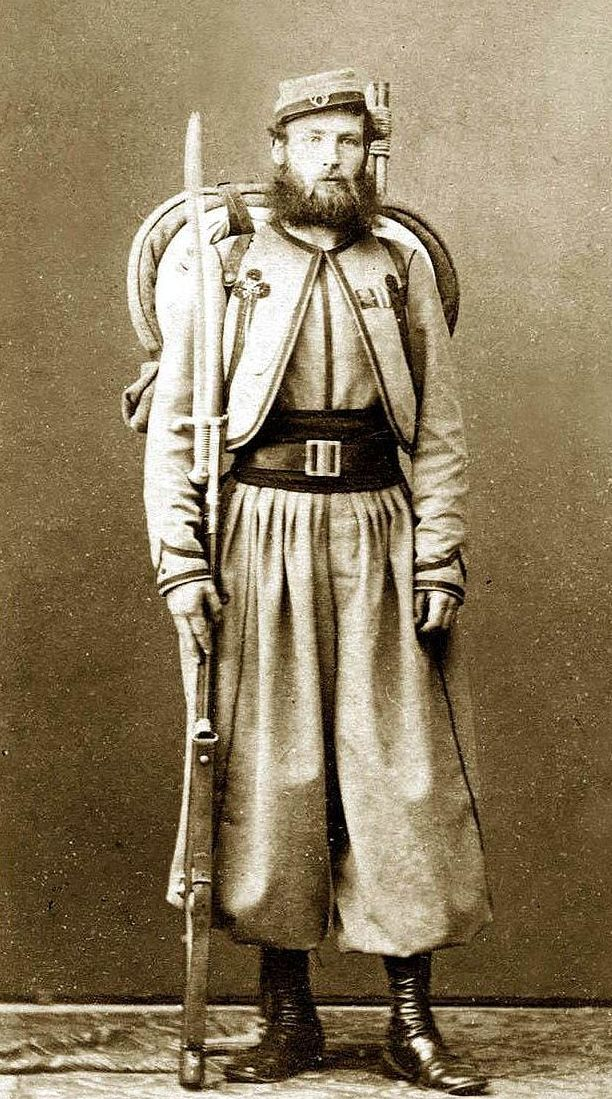 Pontifical Zouave